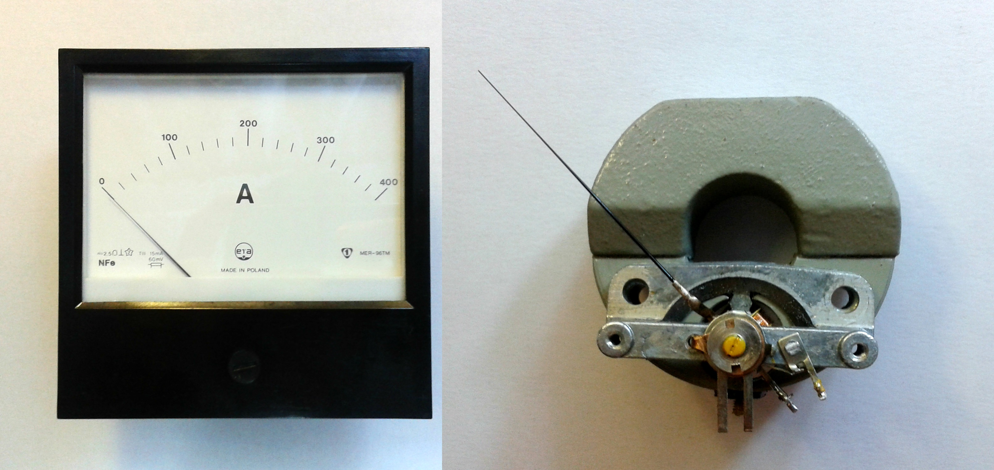 Amperomierz tablicowy MER-96TM produkcji ERA-GOST oraz jego magnetoelektryczny ustrój pomiarowy.